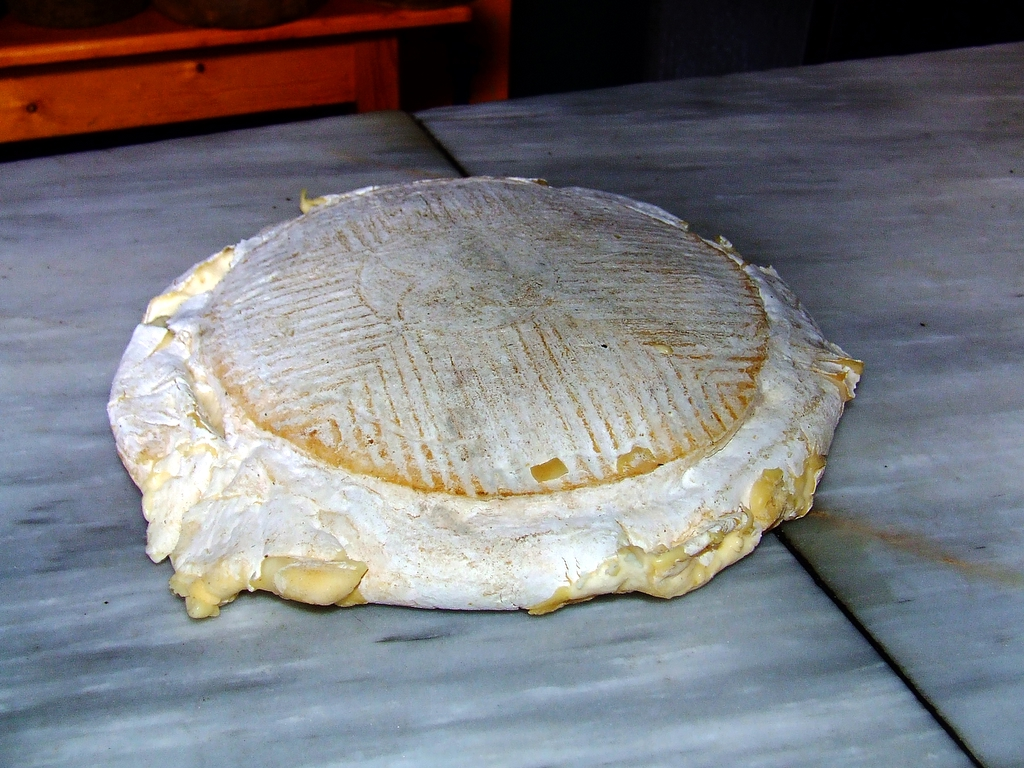 Queso de flor, típico de las comarcas del noroeste de Gran Canaria